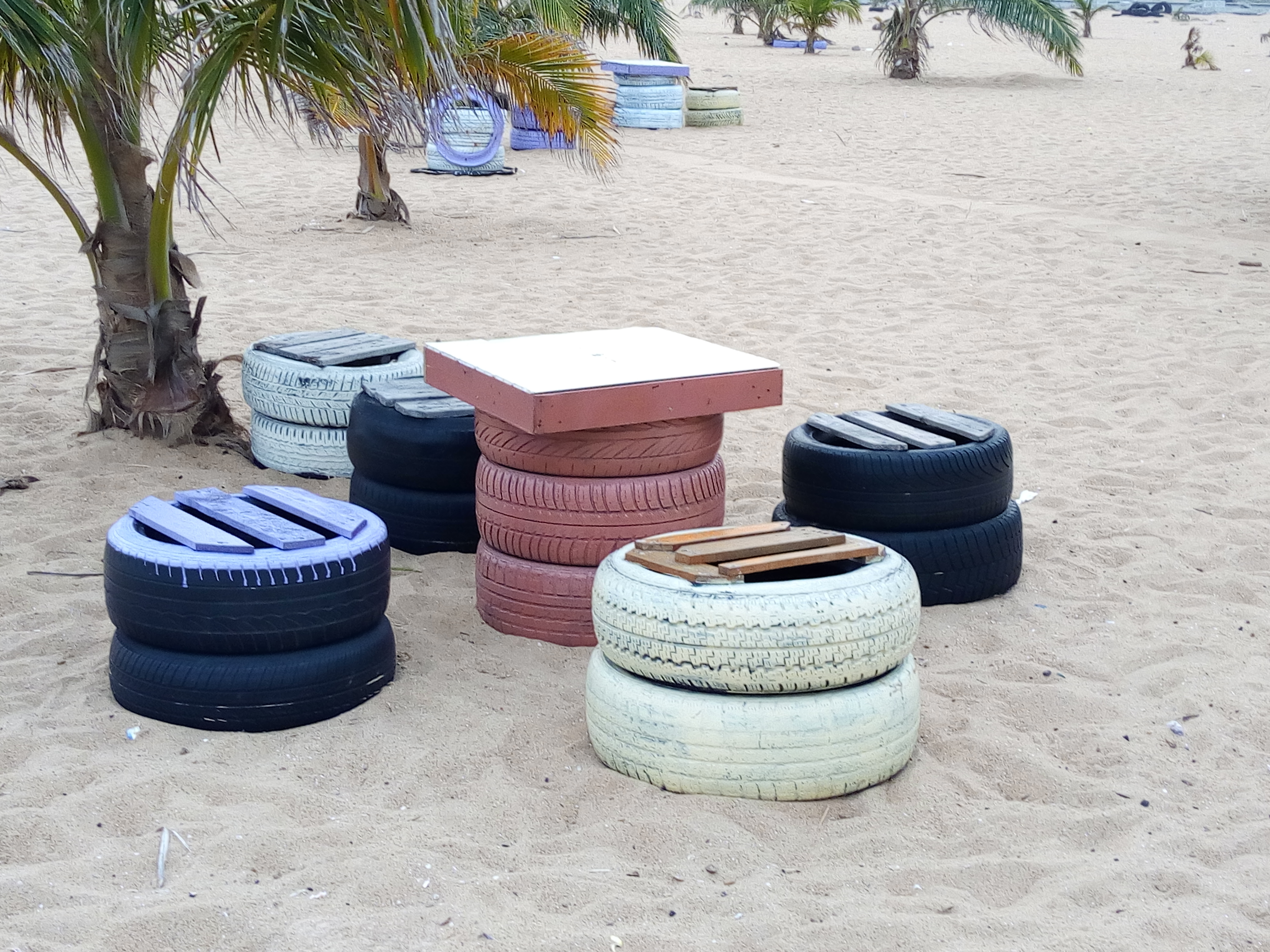 Pneus recyclés et transformés en Sièges disposés à la plage de fidjrossè Cotonou.